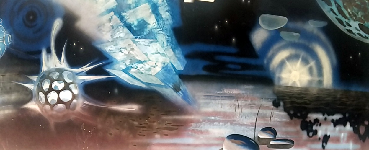 Планетариум ВВМУ Стенопис 1